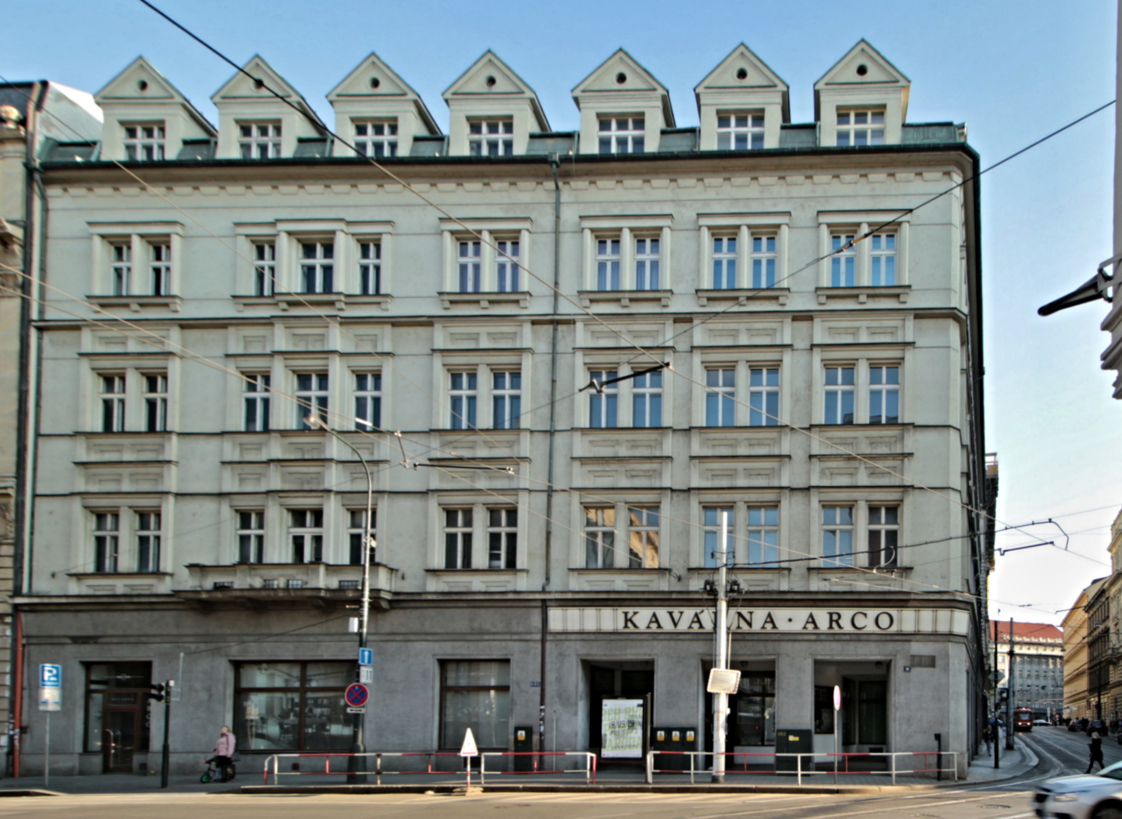 Kavárna Arco Praha